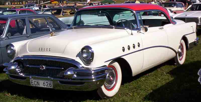 1955 Buick Roadmaster Riviera Series 70 Model 76R 2-door Hardtop